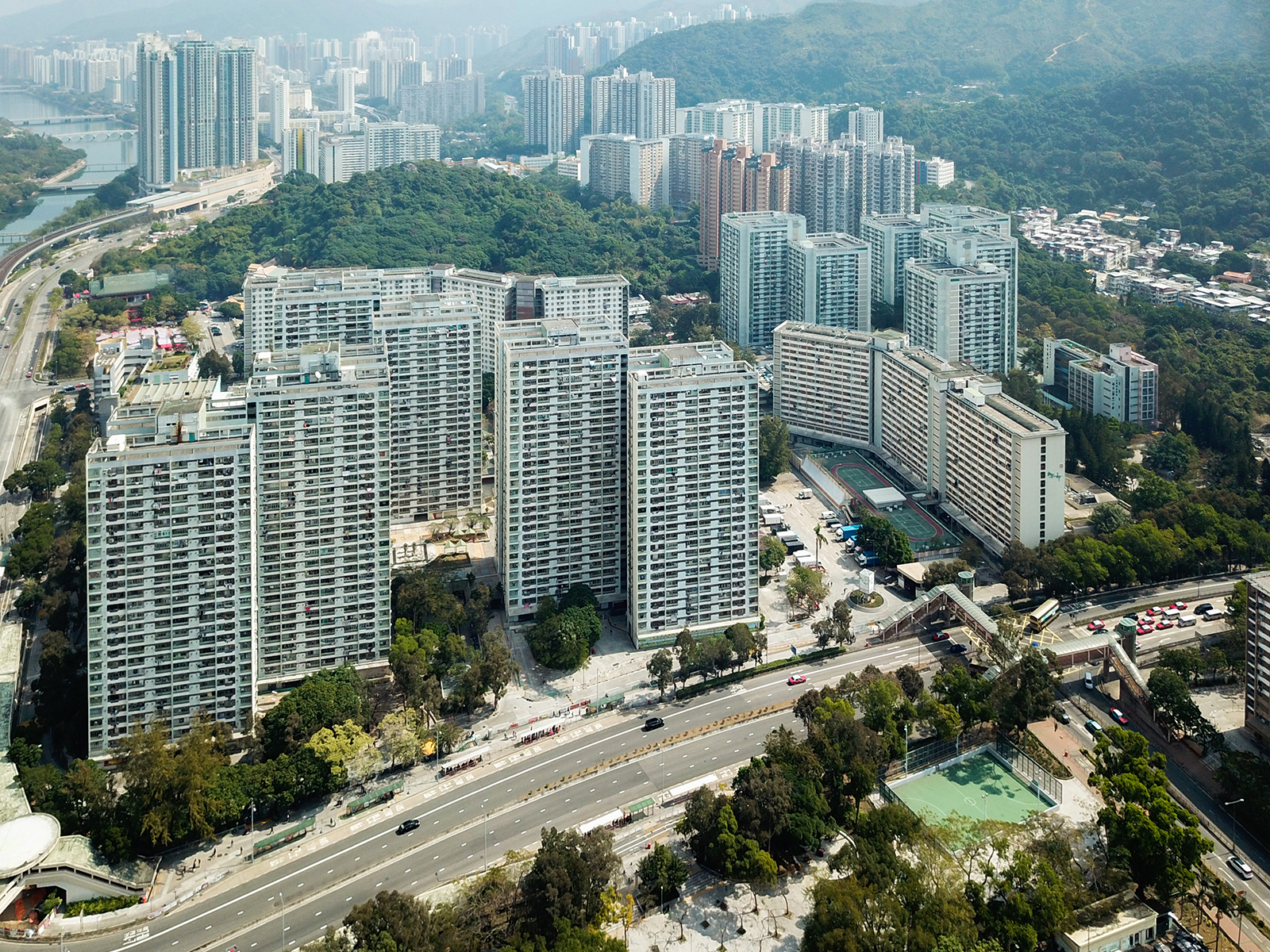 Sun Chui Estate